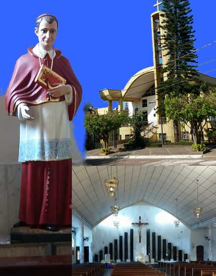 Imagem de São Carlos Barromeu e sua igreja da Rua do Oratório, Vila Prudente